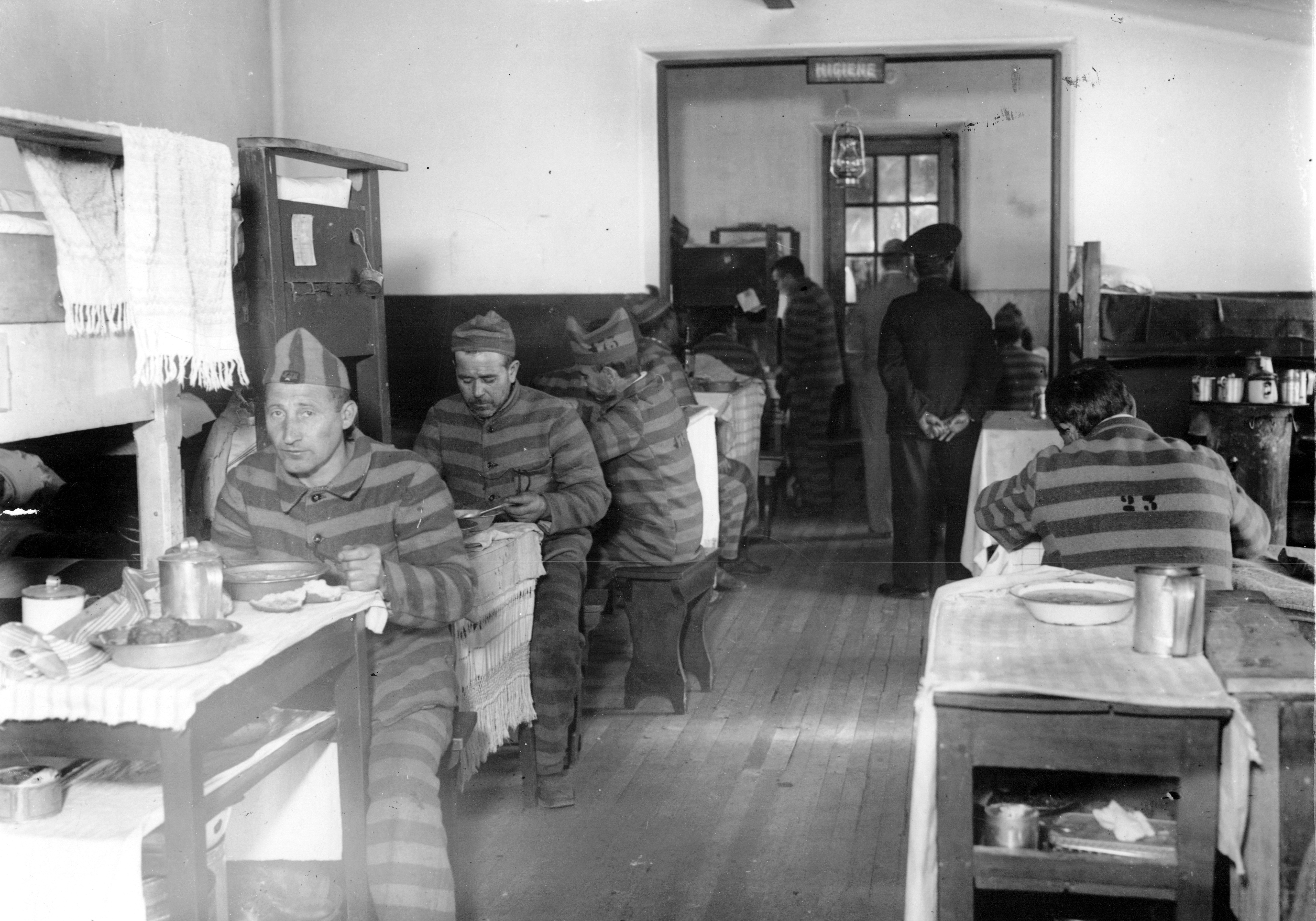 Cárcel del fin del mundo, comedor de reclusos. Ushuaia 1933. Documento Fotográfico 18363 General Archive of the Nation Native nameArchivo General de la Nación ArgentinaLocationBuenos Aires, ArgentinaCoordinates34° 36′ 17″ S, 58° 22′ 14″ W Established28 August 1821Web pageAGNAuthority control : Q2860529 ISNI: 0000 0001 2375 5869 LCCN: n82144709 WorldCat institution QS:P195,Q2860529 This file, was provided to Wikimedia Commonsthanks to an agreement between the General Archive of the Nation of Argentina and Wikimedia Argentina.